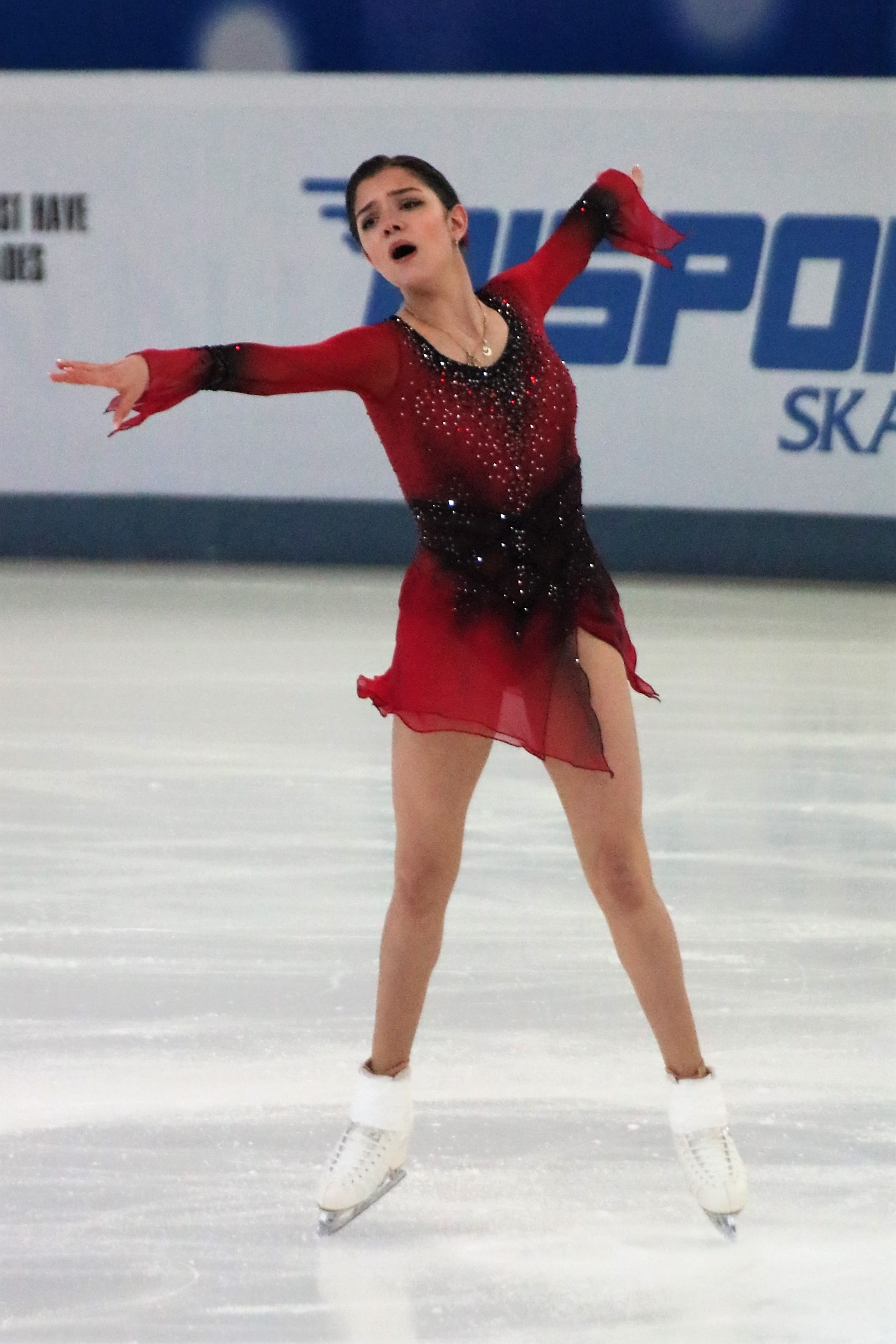 Евгения Медведева на чемпионате России по фигурному катанию на коньках 2019